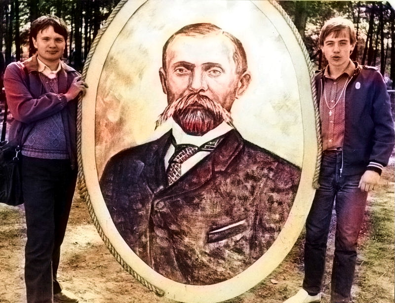 Святкаванне 150-годдзя Францішка Багушэвіча на радзіме пісьменніка (в. Свіраны, Віленшчына). Талакоўцы, краязнаўца Ігар Гатальскі і пісьменнік Алег Грушэцкі. Раскаляраванае фота.